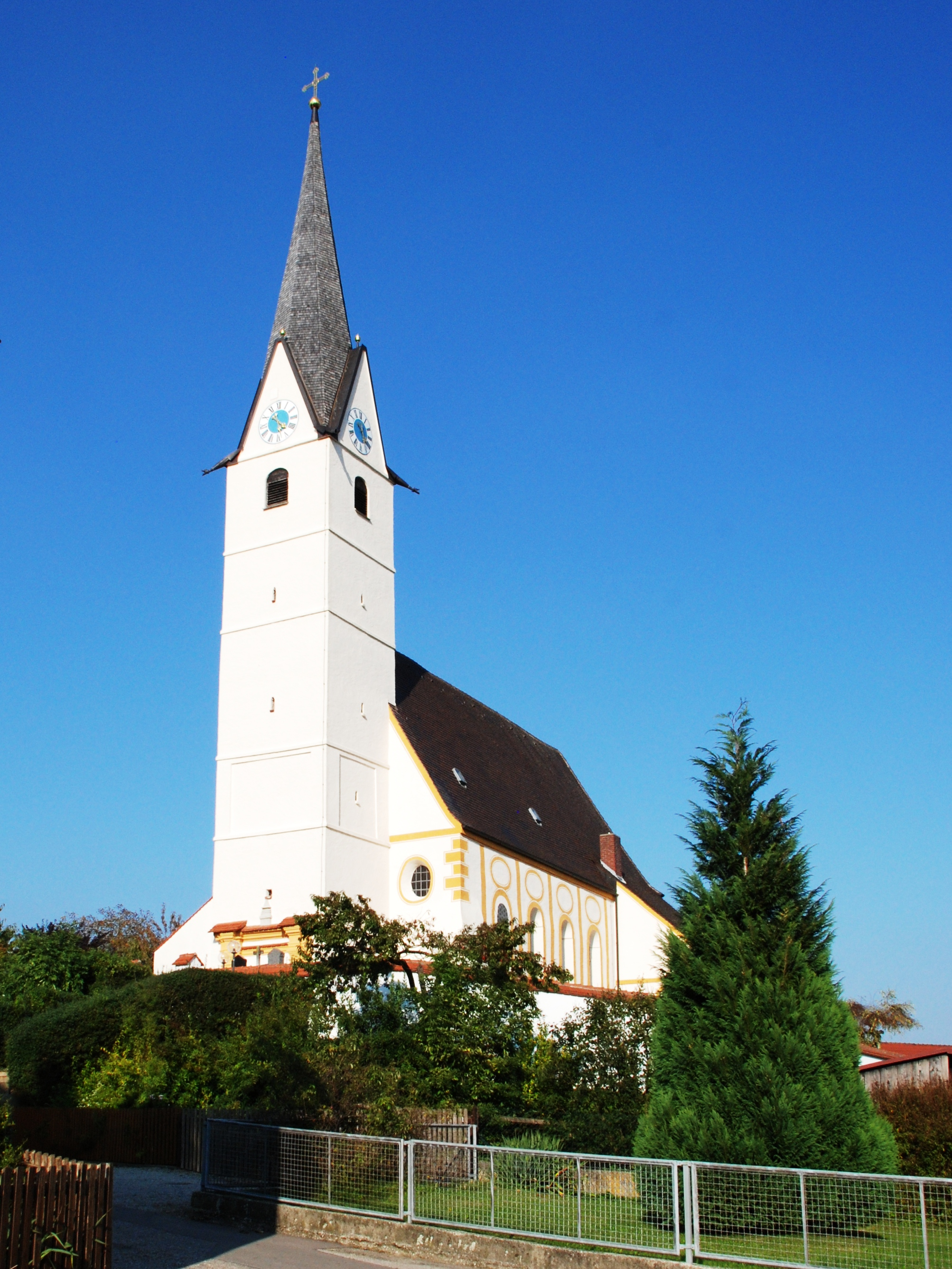 Katholische Kirche Mariä Heimsuchung in Massenhausen, Ortsteil von Neufahrn, Landkreis Freising, Regierungsbezirk Oberbayern, Bayern. Als Baudenkmal in der Bayerischen Denkmalliste aufgeführt.